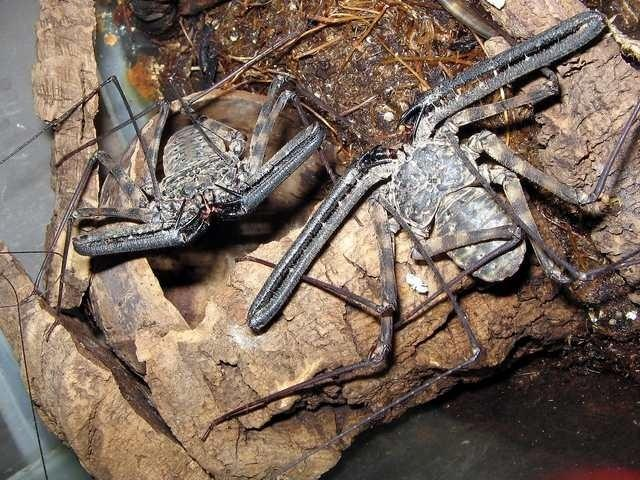 leošek a brácha